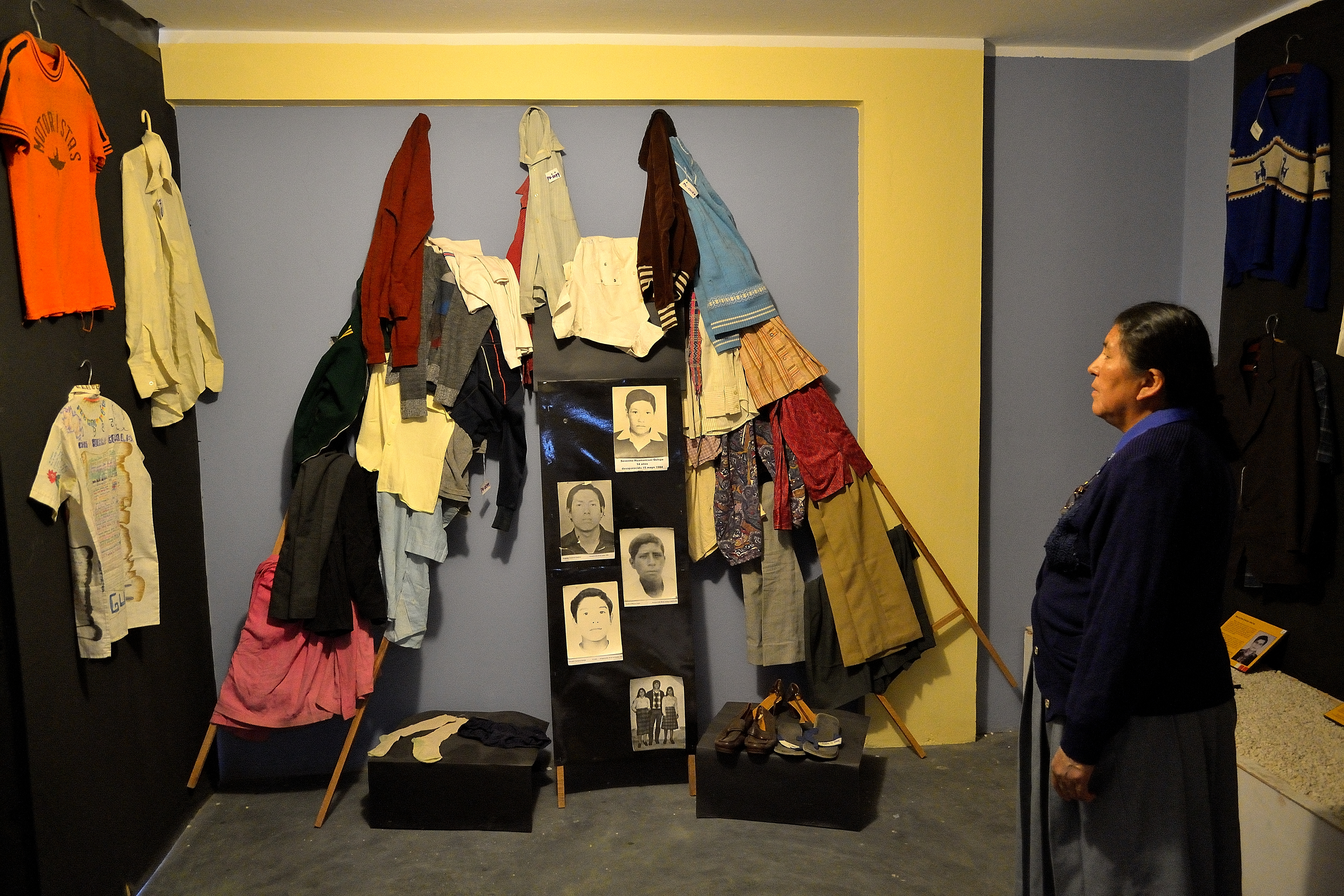 acurricu